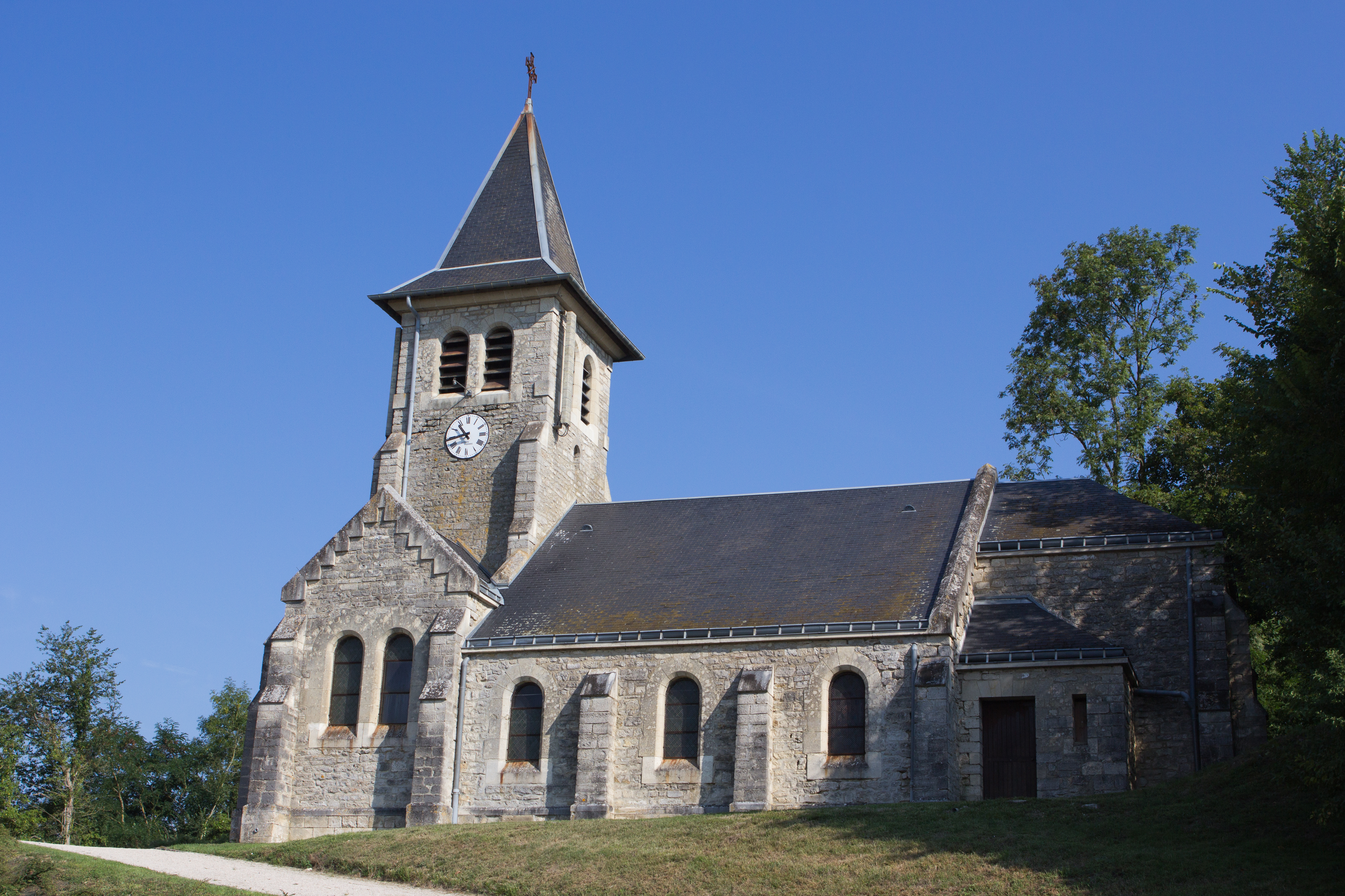 Eglise de Neuville-sur-Ailette, Neuville-sur-Ailette, Aisne, France